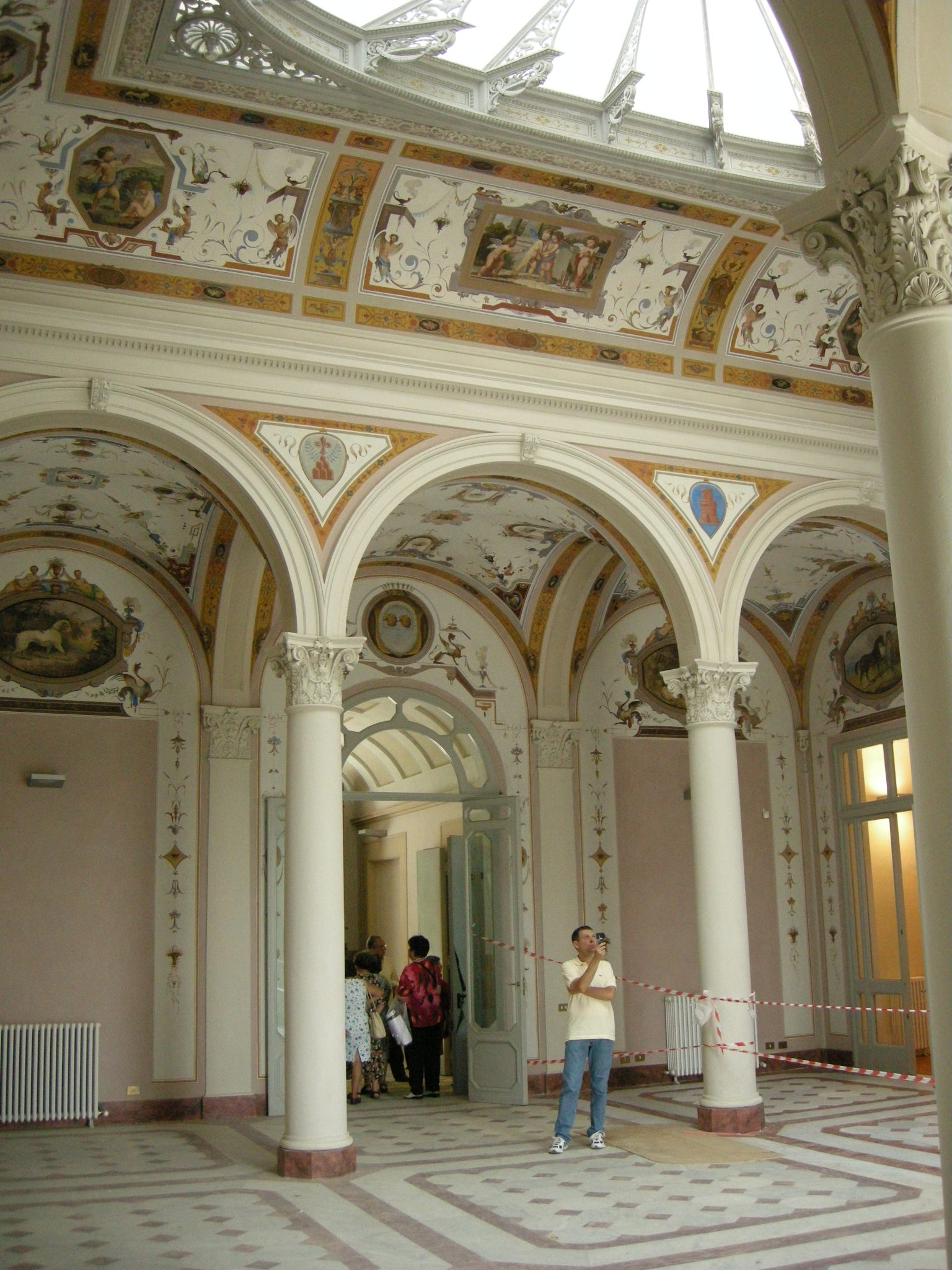 Villa favard di rovezzano, Salone dei giochi